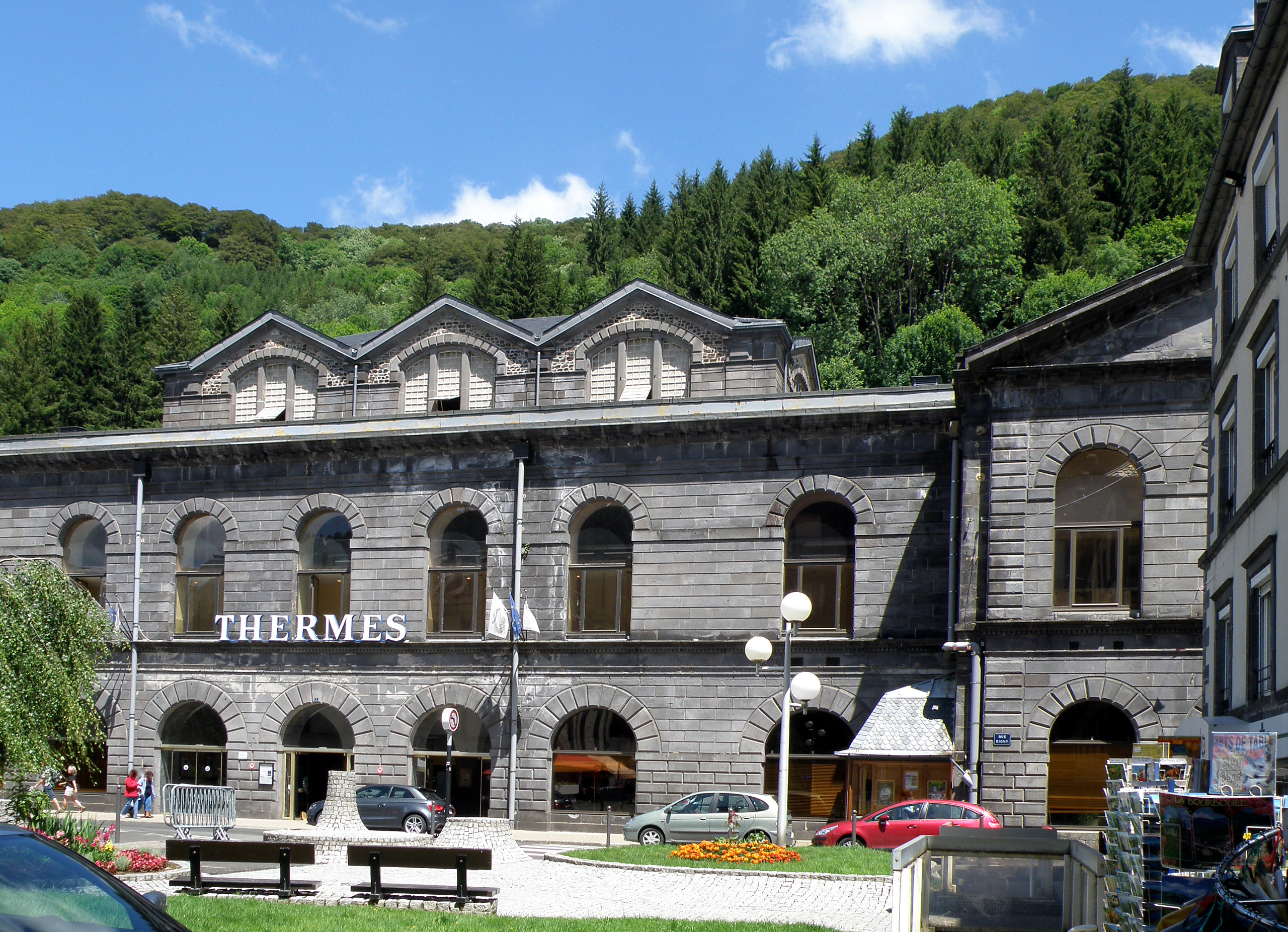 Le Mont-Dore, ville du Puy-de-Dôme (France, région Auvergne). Thermes (établissement thermal), place du Panthéon.